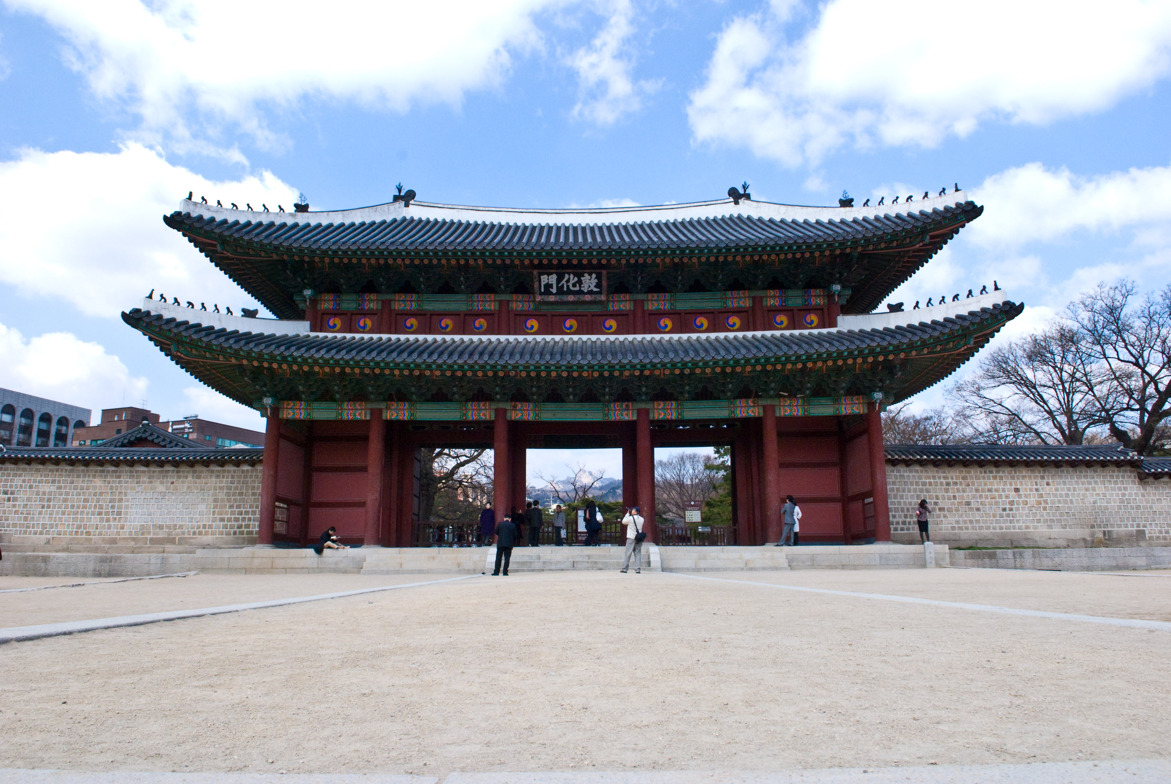 Korea-Seoul-Changdeokgung-Donhwamun